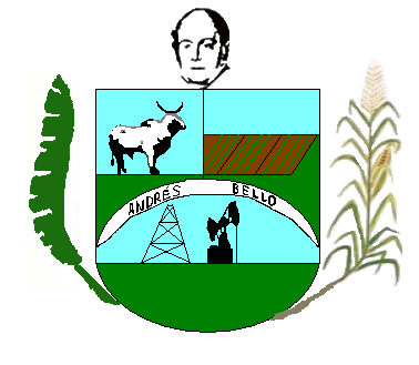 Escudo del municipio Andrés Bello. Estado Trujillo. Venezuela. Este escudo está realizado en base a una descripción escrita, por lo que es una aproximación al escudo real, si alguien encuentra el escudo real por favor sustituir este.